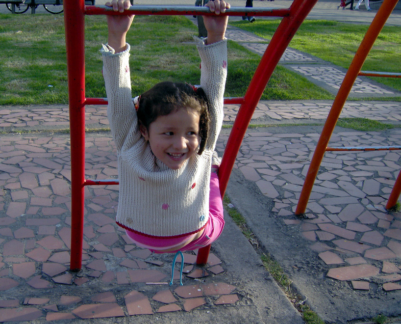 Guiliana moreno Jugando en bogota